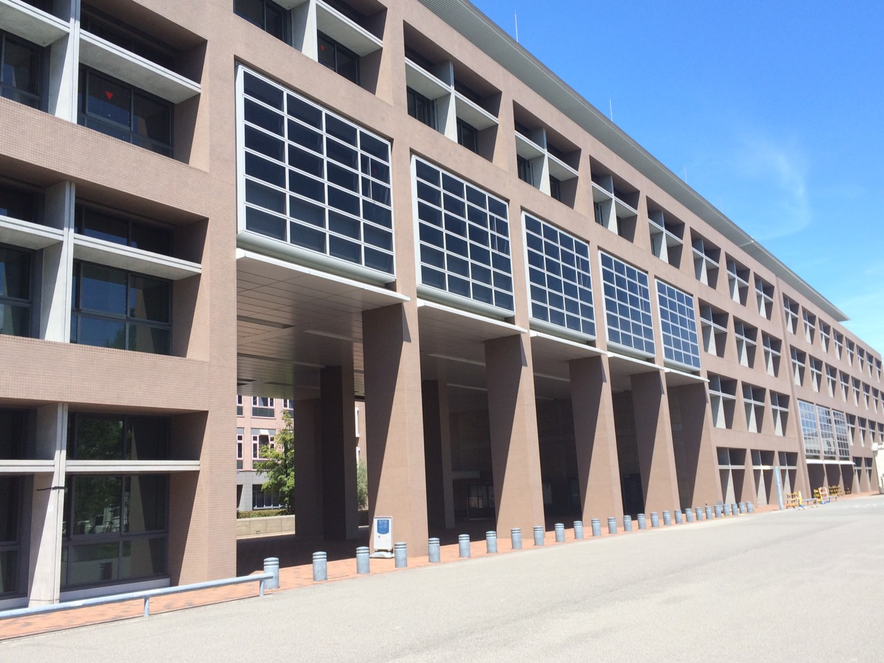 ぜんがくです